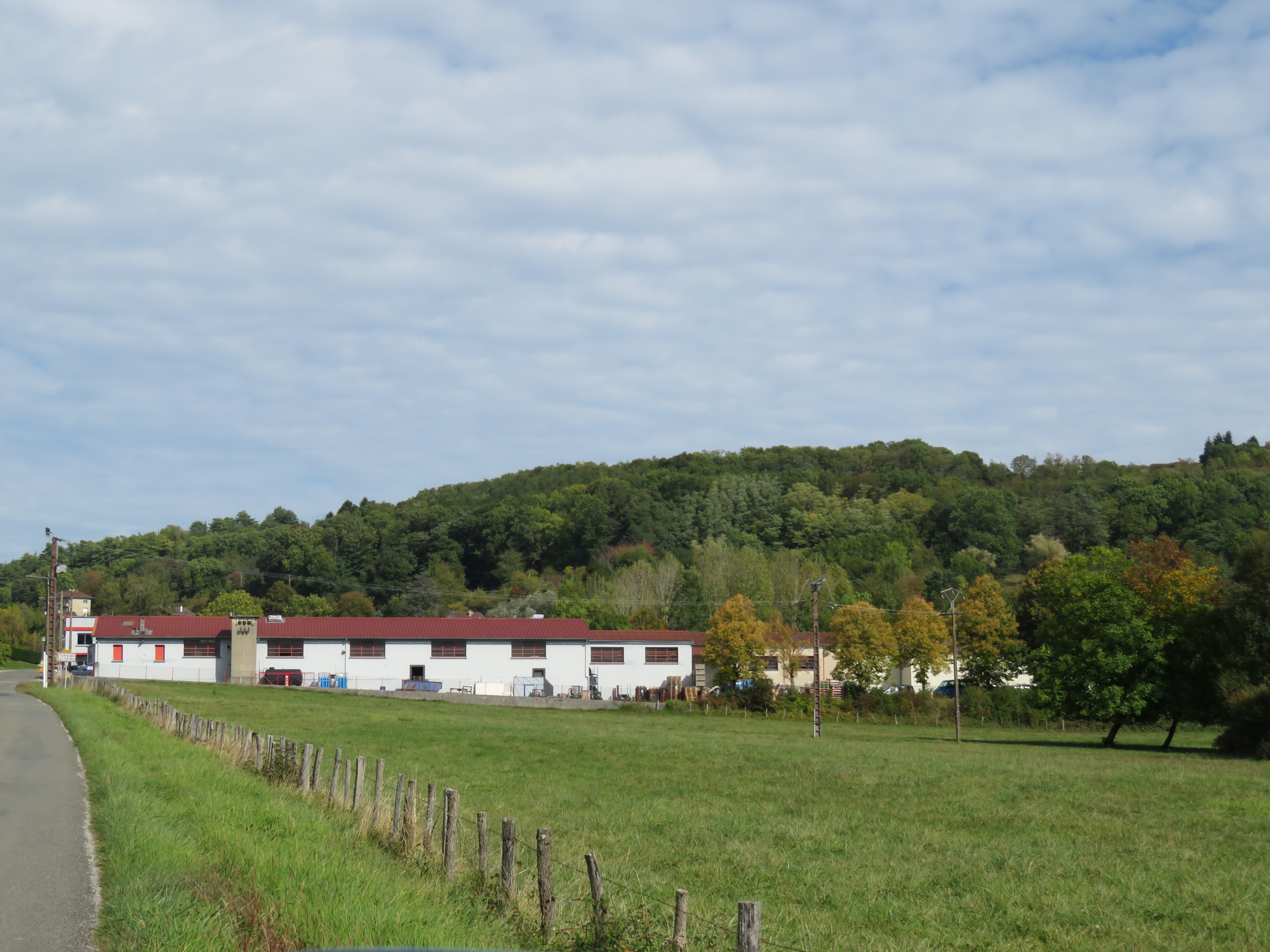 Usine Kiva à Lons-le-Saunier (Fontaine-aux-Daims).